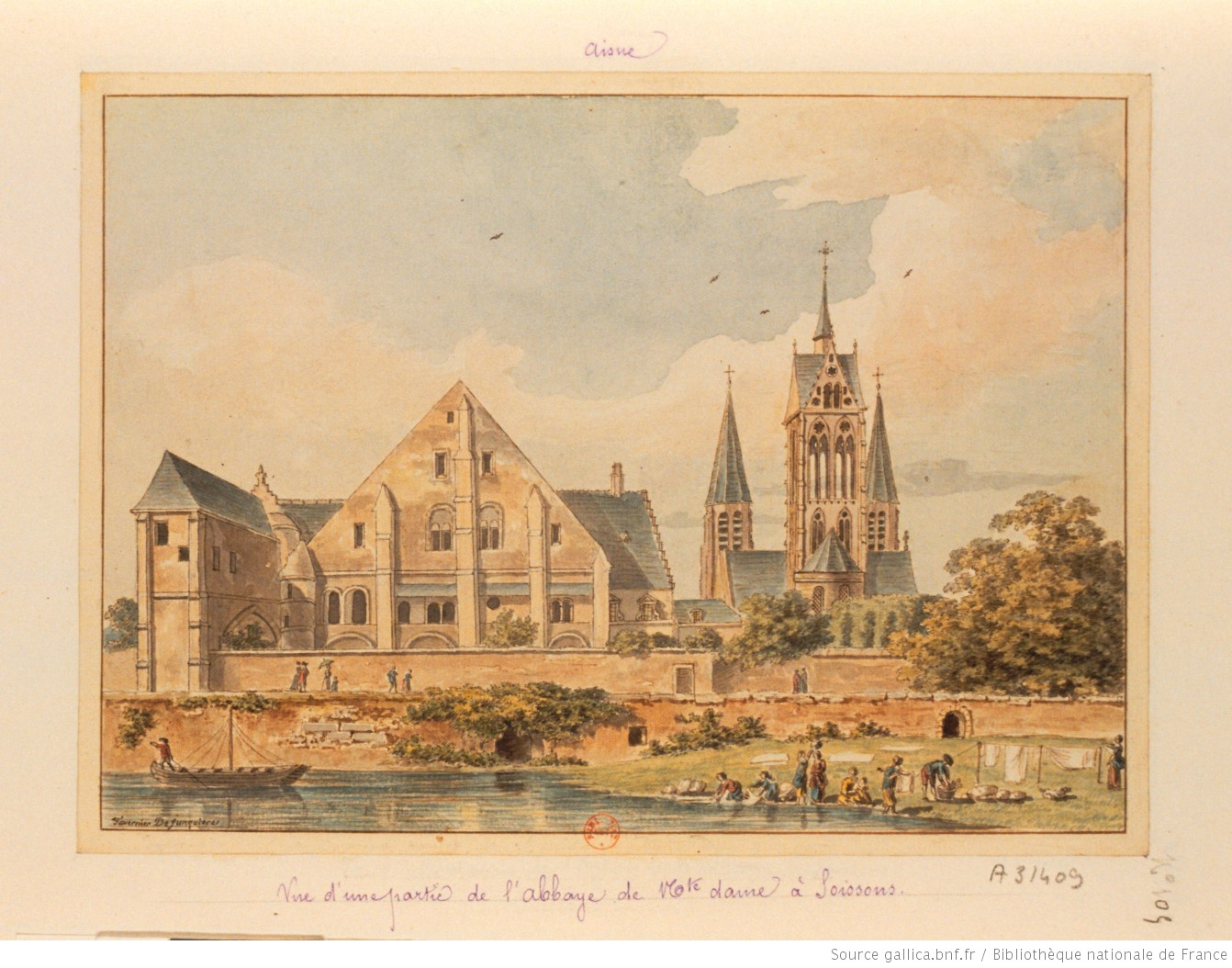 vue partielle de l'abbaye.